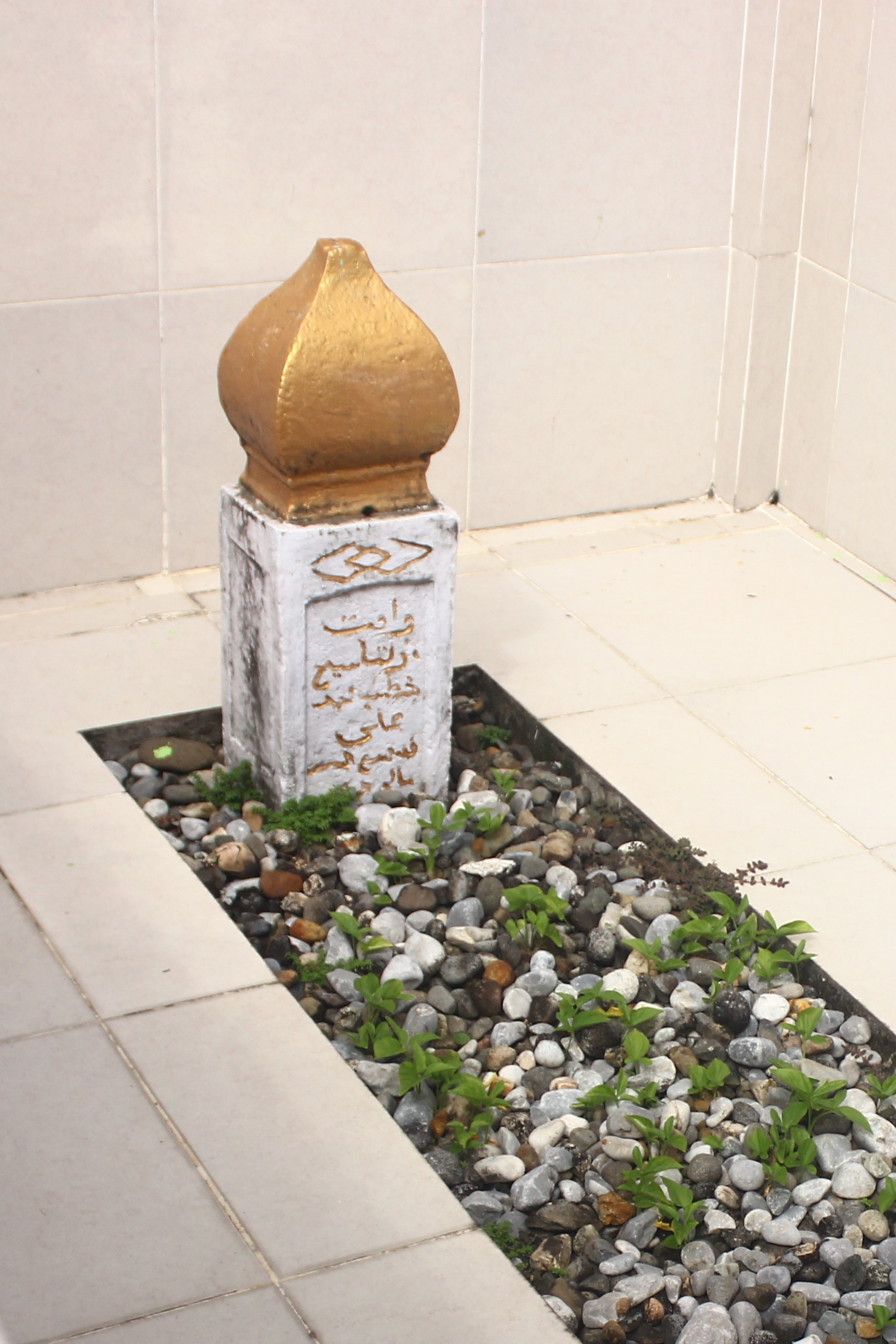 Masjid Istighfar di Kelurahan Ganting Parak Gadang, Kecamatan Padang Timur, Kota Padang, Sumatra Barat, Indonesia.